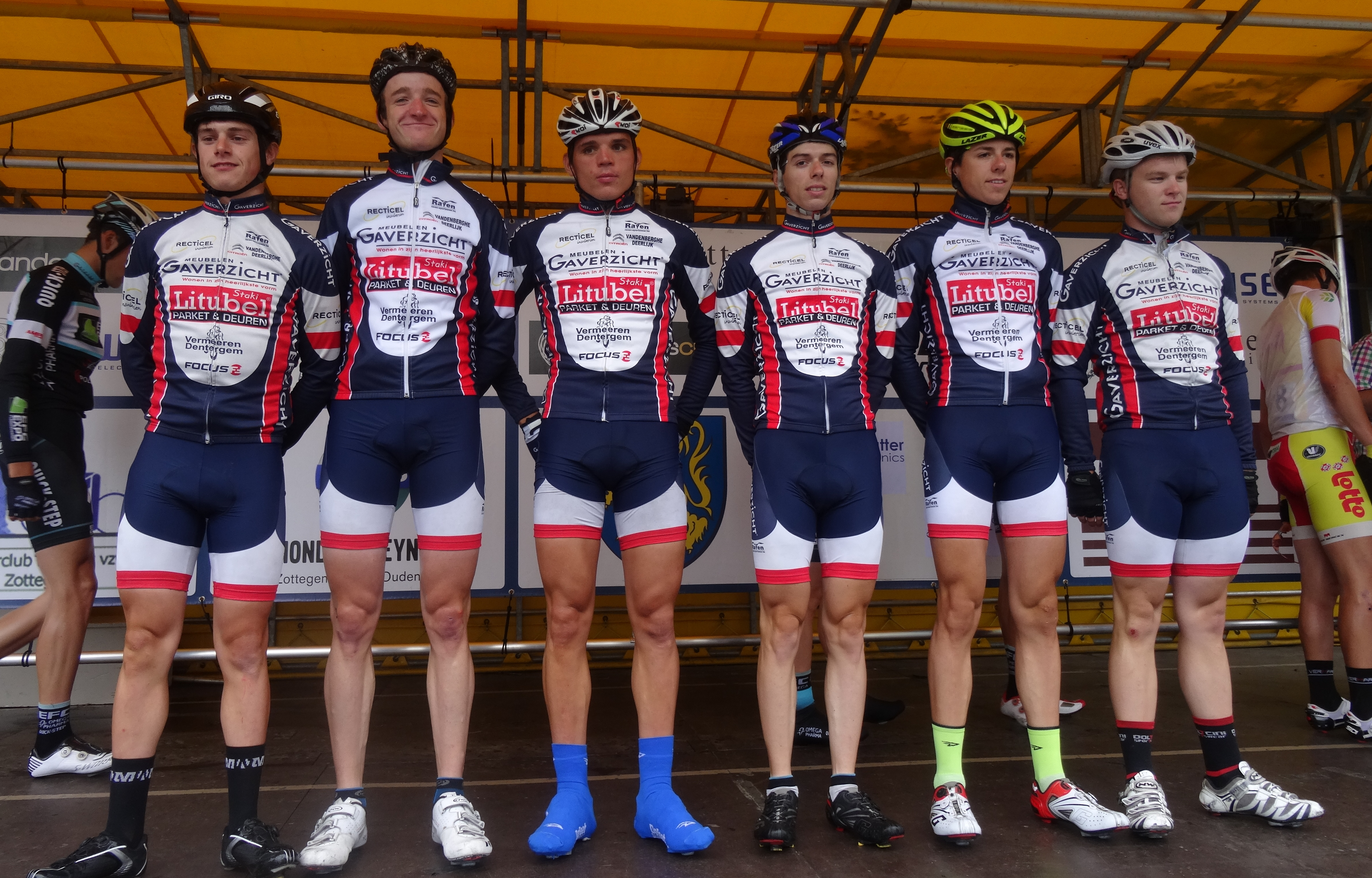 Reportage photographique réalisé le samedi 5 juillet à l'occasion du départ et de l'arrivée du Circuit Het Nieuwsblad espoirs 2014 à Grotenberge (Zottegem), Belgique.